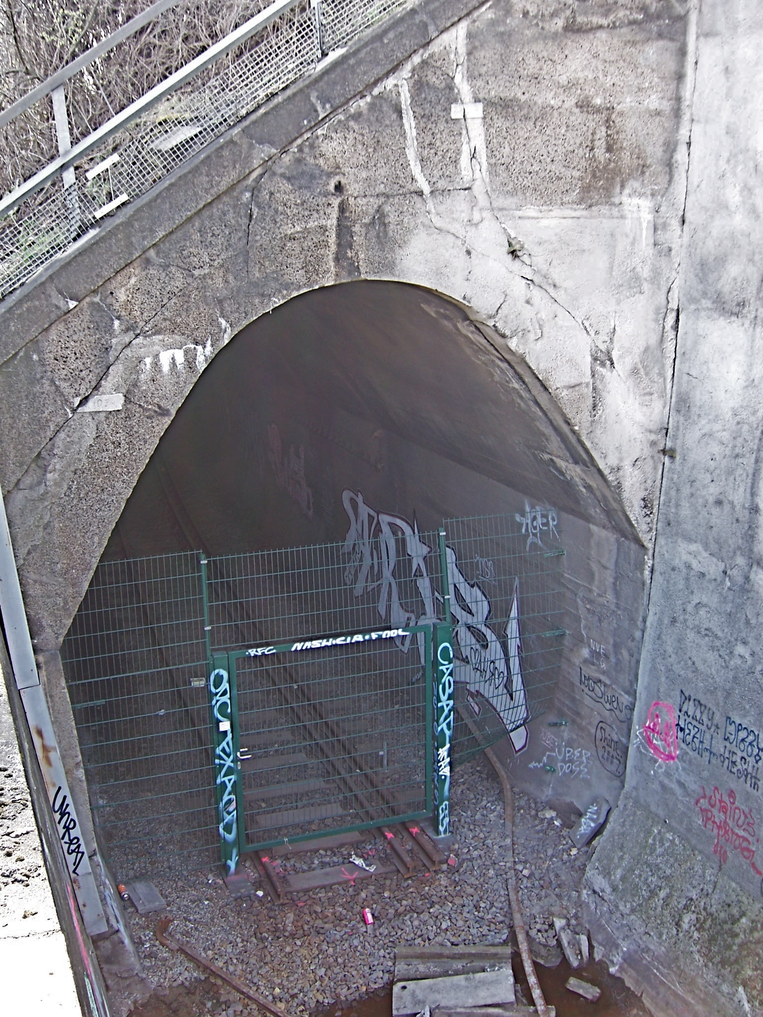 Berlin Osthafentunnel, Nordportal